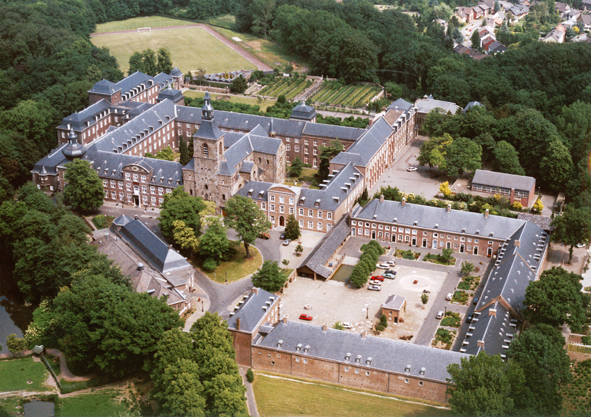 Abdij Rolduc